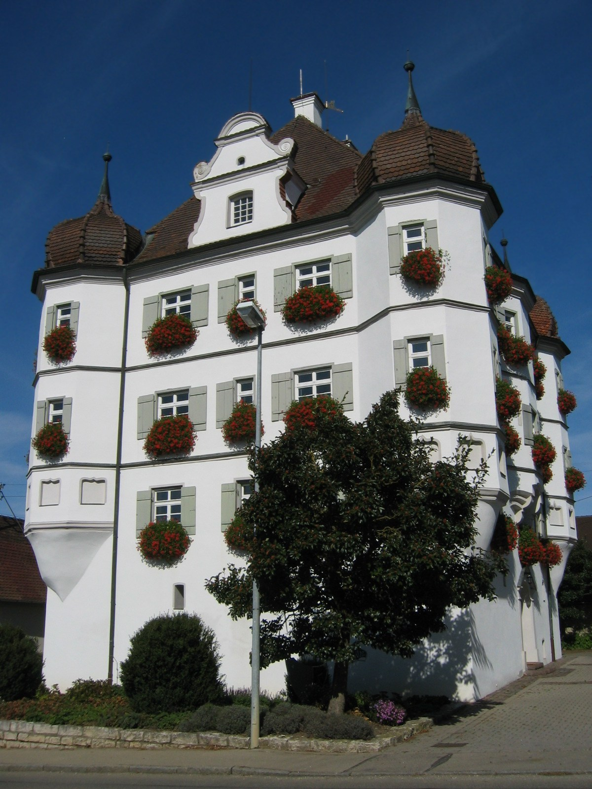 Bernstadt, Alb-Donau-Kreis: Schloss (heute Rathaus)